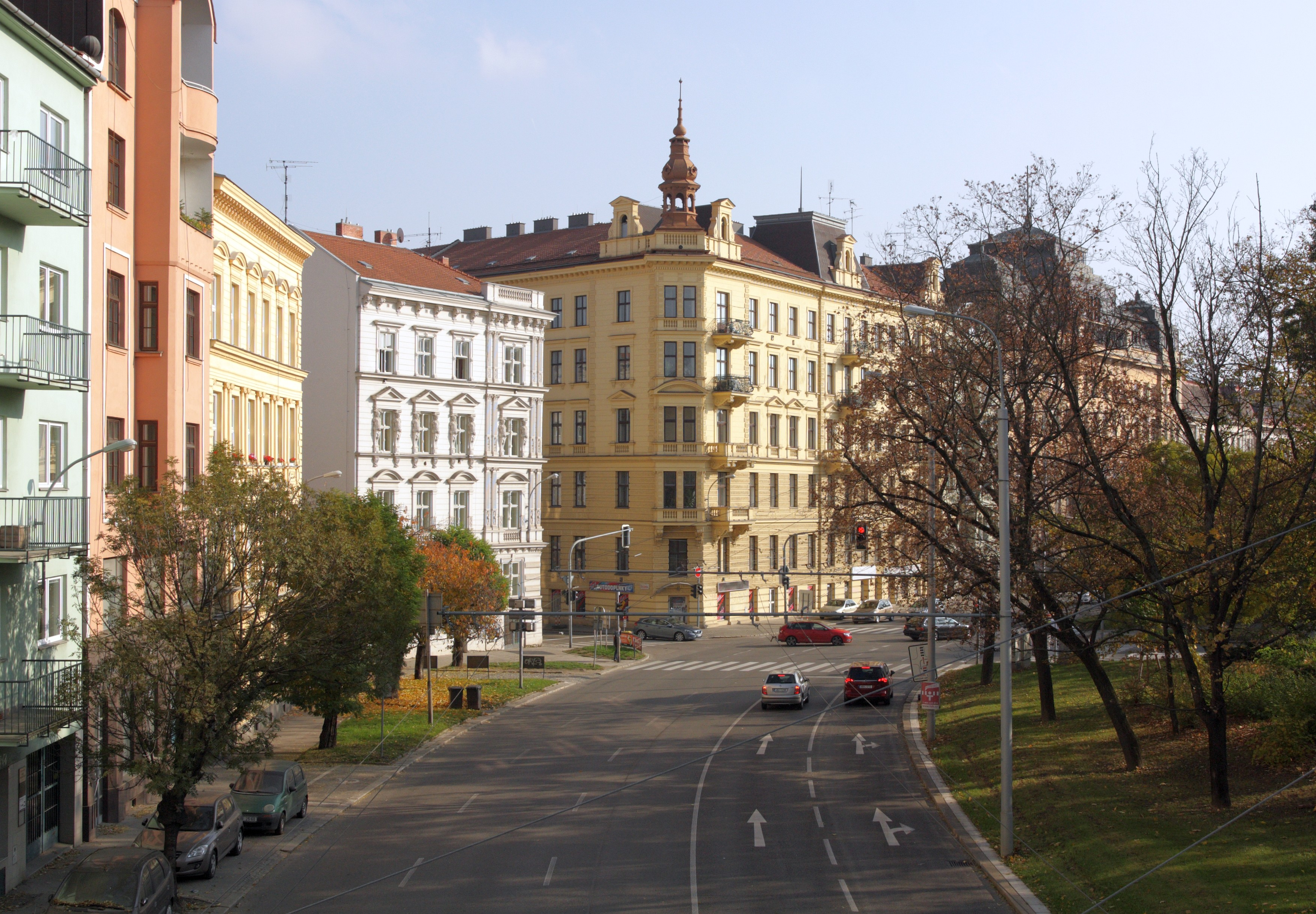 Brno - ul. Koliště, pohled z lávky IBC k JV